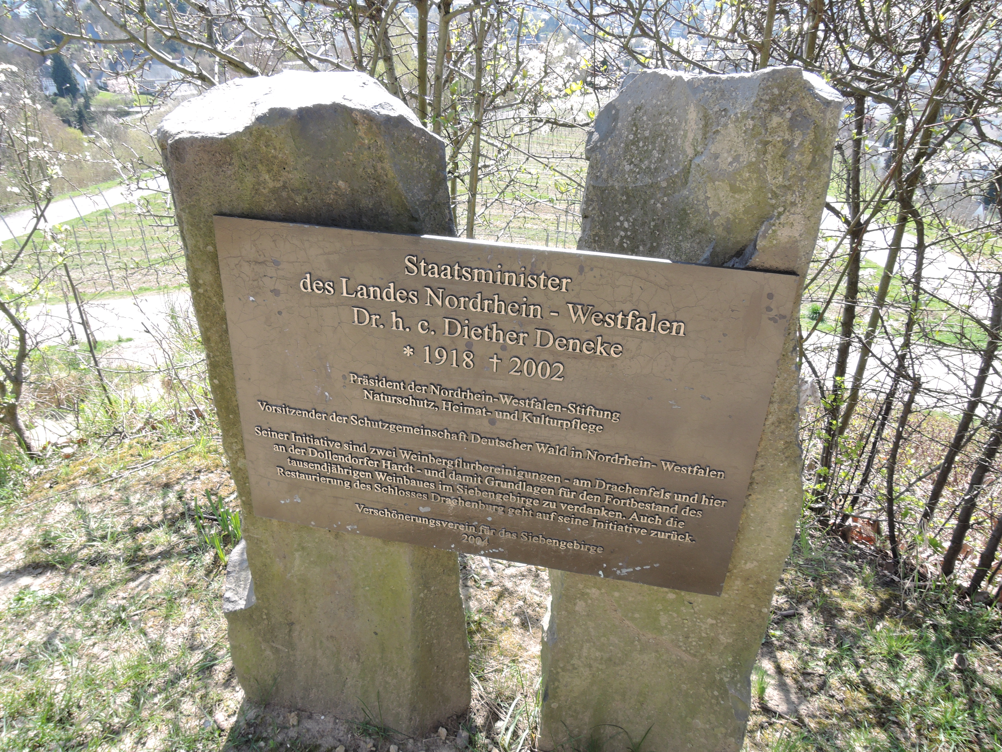 Weinberg Oberdollendorf